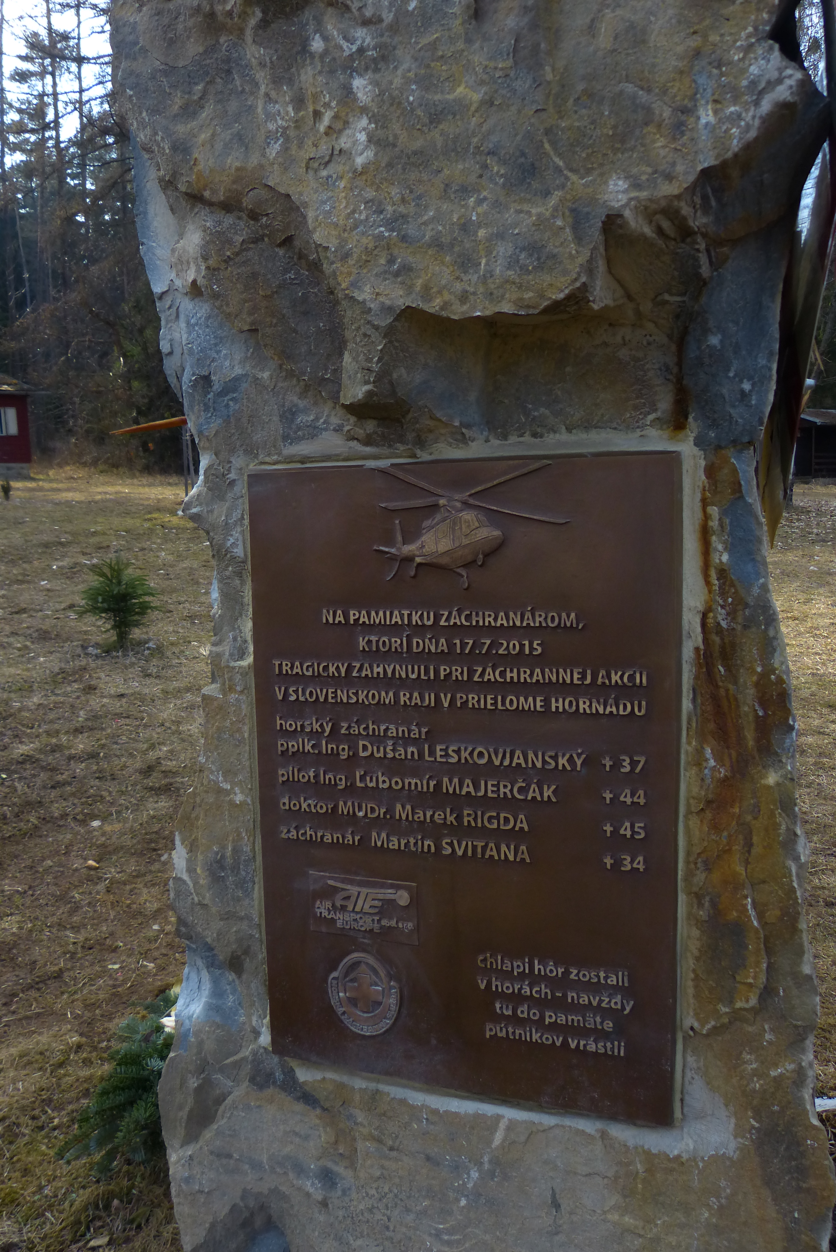 Detail pomníka záchranárov zo Slovenského raja, oblasť Kláštorisko.